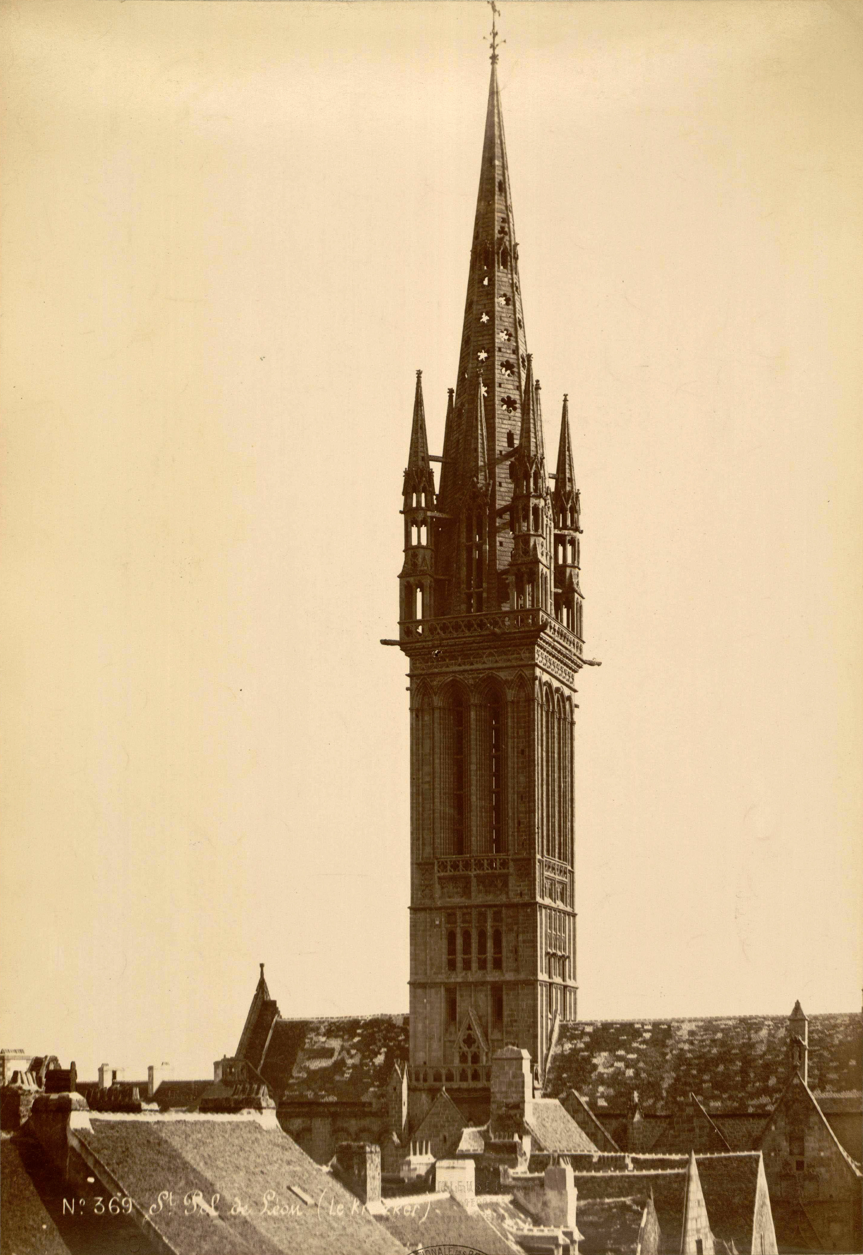 Photographie de la chapelle Notre-Dame du Kreisker au 19e siècle (Saint-Pol-de-Léon, Finistère, France) par Séraphin-Médéric Mieusement (1840-1905)